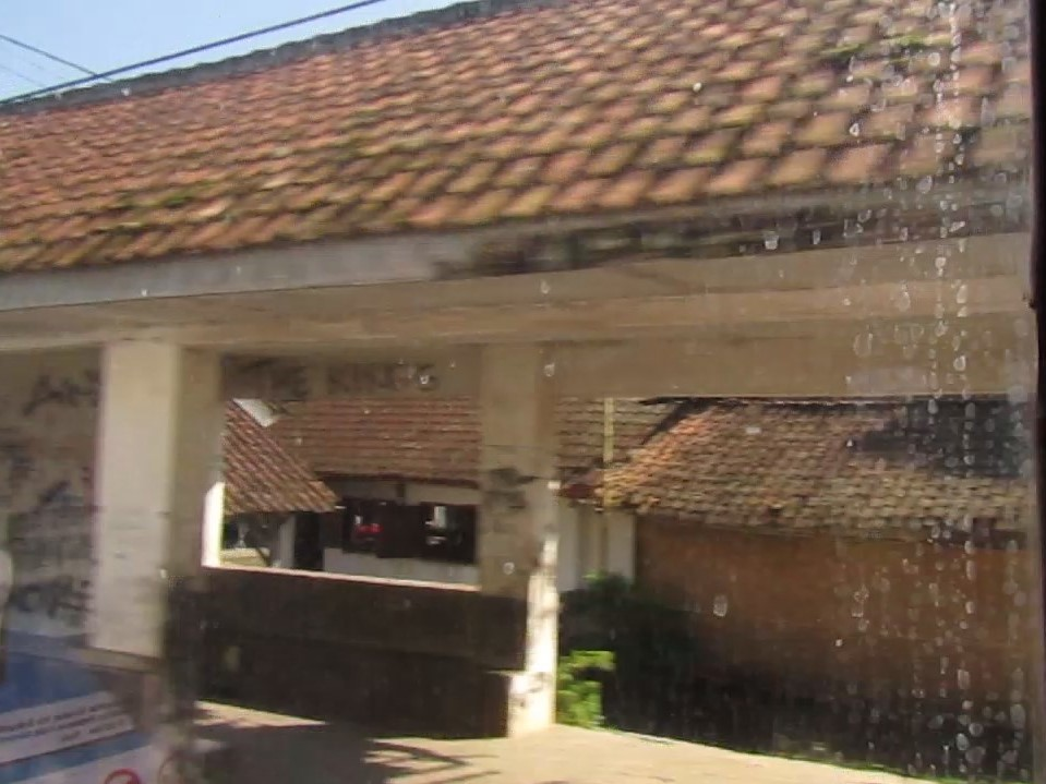 Pintu keberangkatan Halte Sumbersalak